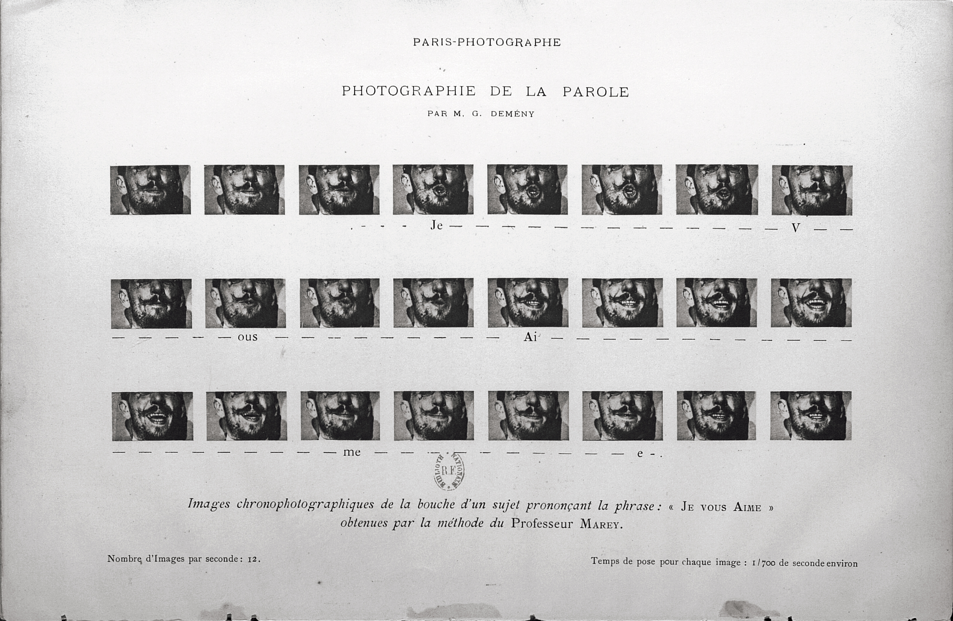 Chronophotographie de Georges Demenÿ prononçant la phrase "je vous aime".